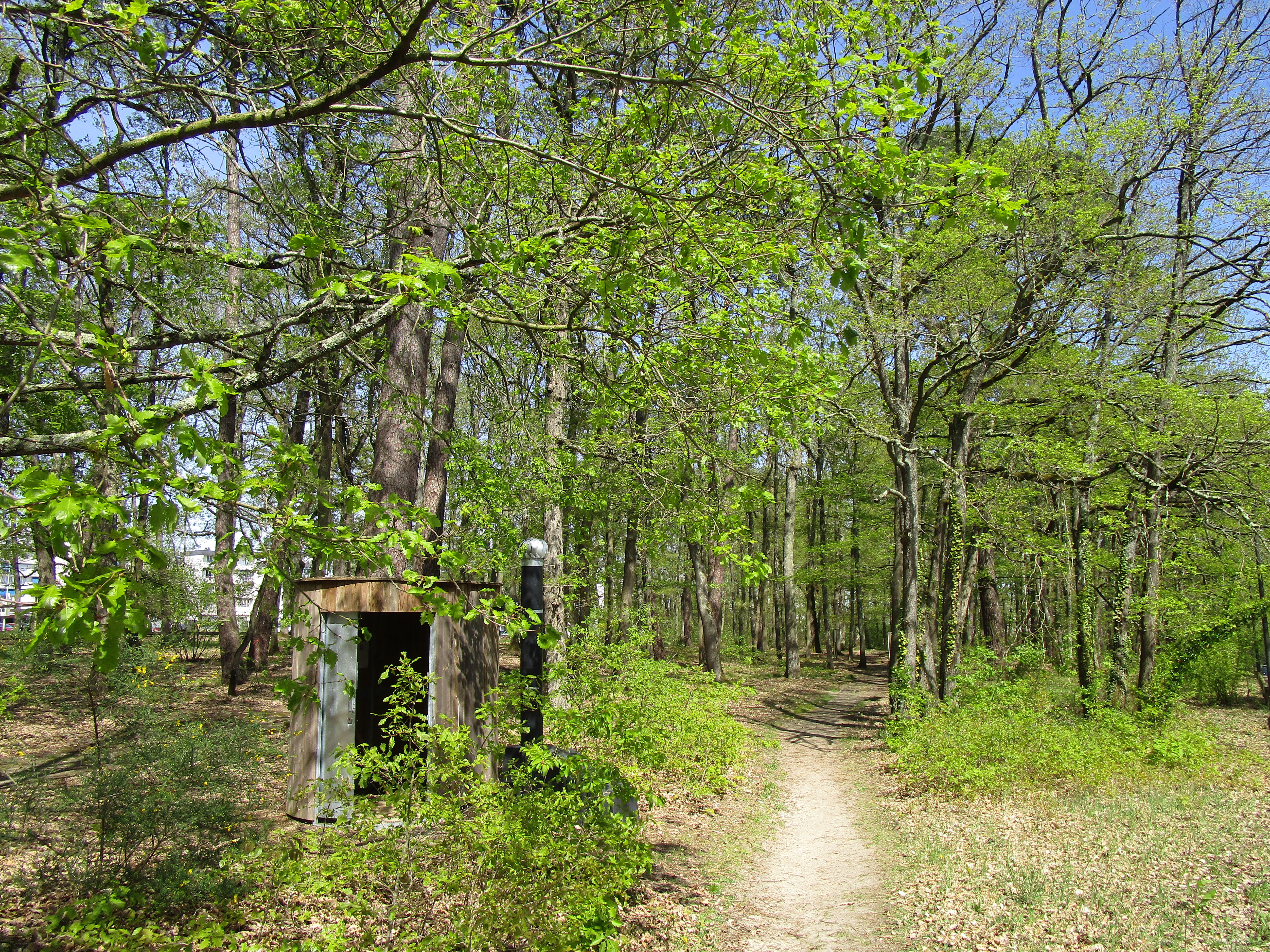 Parc de Grandmont vu depuis l'avenue Chanoine Carlotti, quartier Montjoyeux de Tours